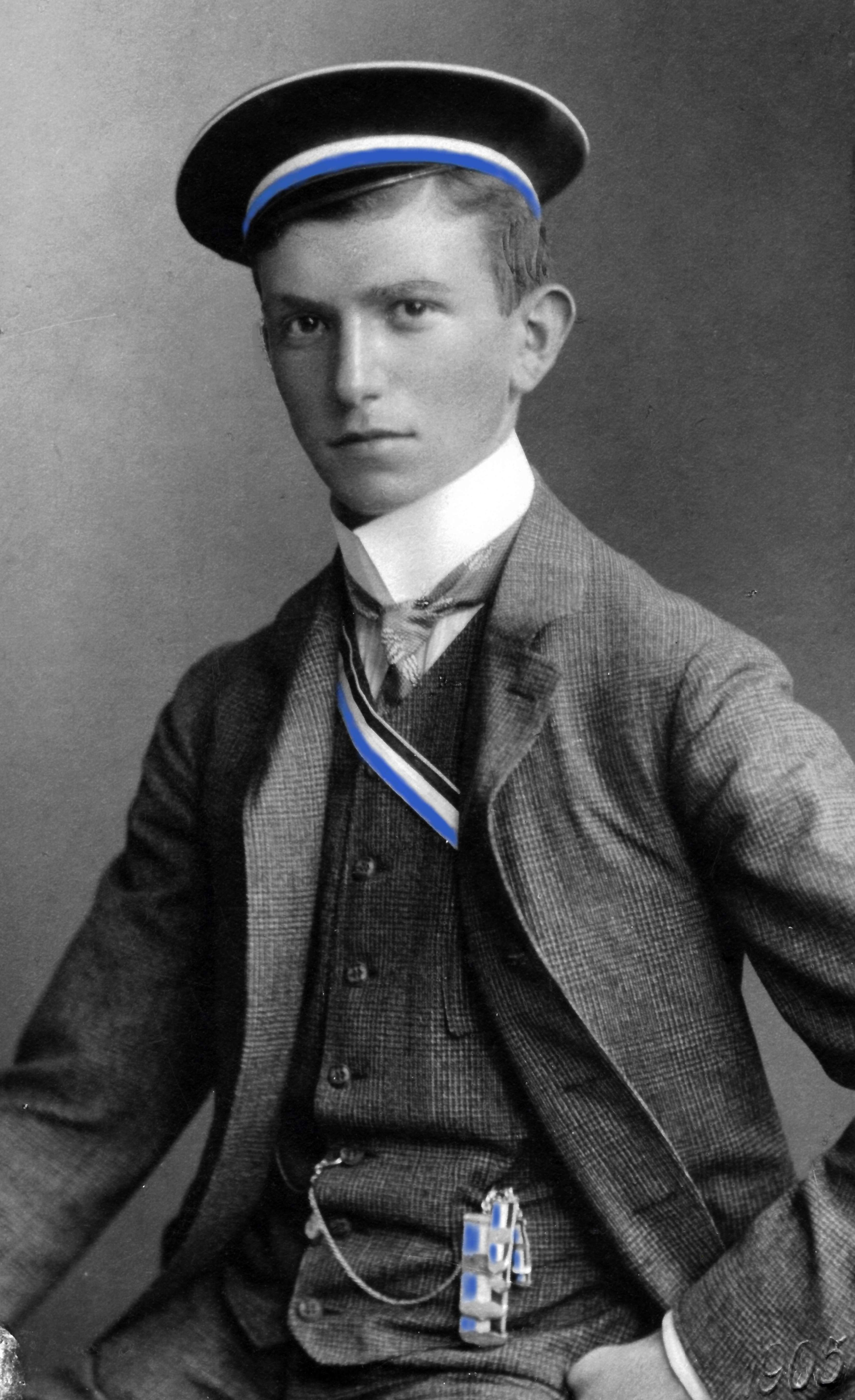 Werner Pollack als Corpsstudent bei Suevia München